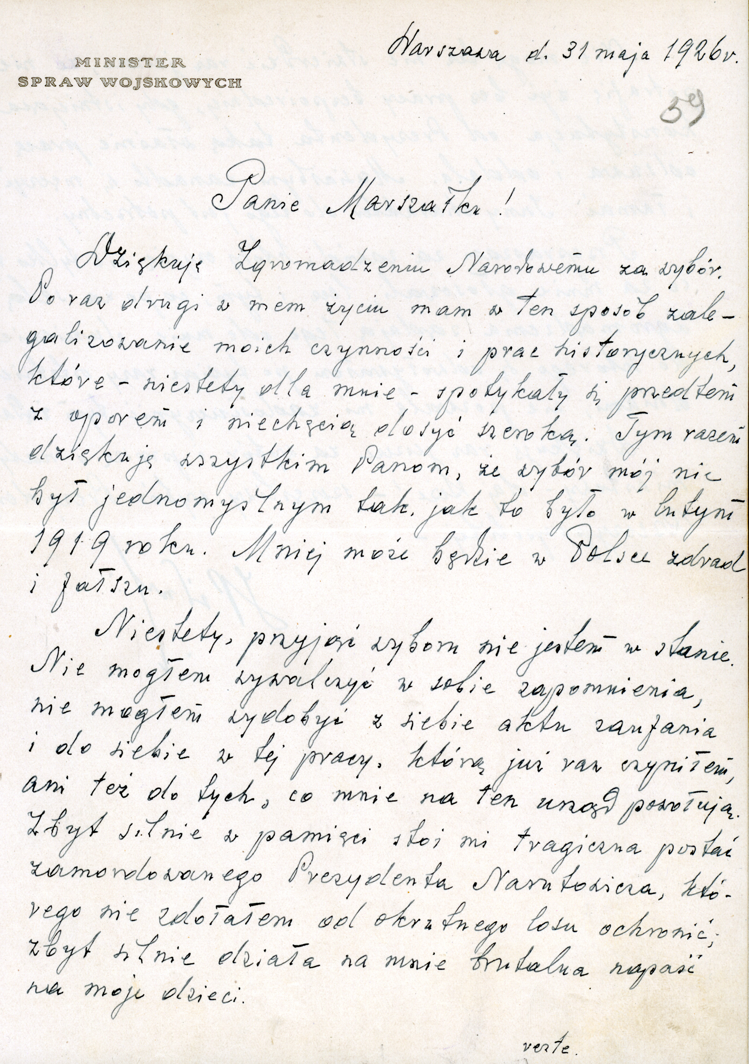 List Józefa Piłsudskiego do Marszałka Sejmu, Przewodniczącego Zgromadzenia Narodowego